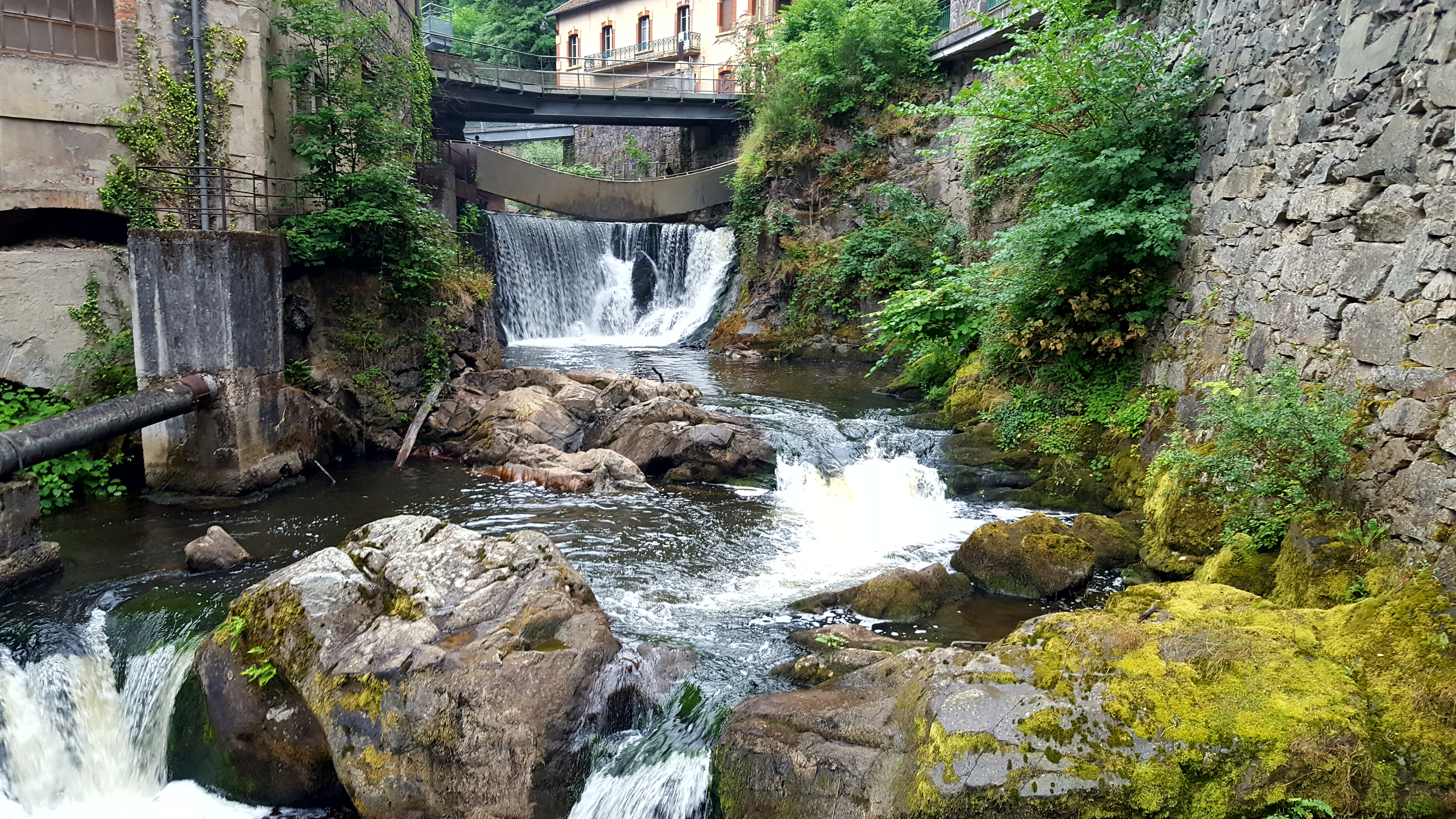 Cascade du creux de l'enfer à Thiers